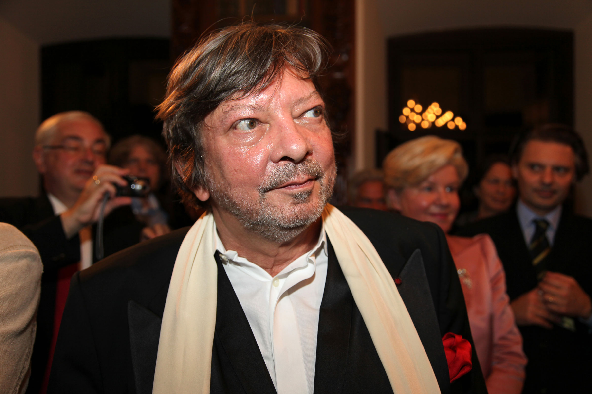 Sasse_Heribert-5394 ; 19.08.2010: Musik-Festival Grafenegg